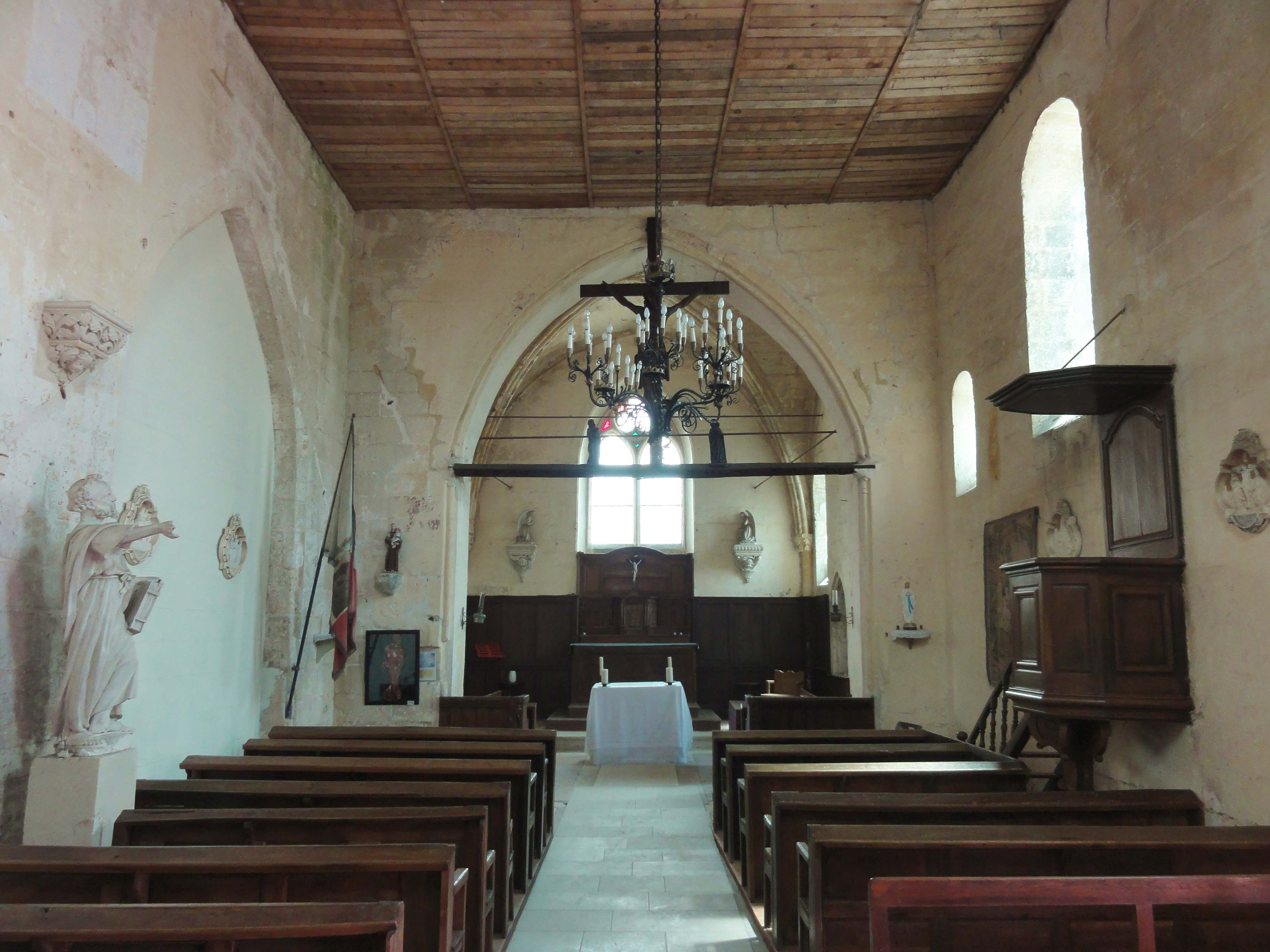 Intérieur de l'église (voir titre).